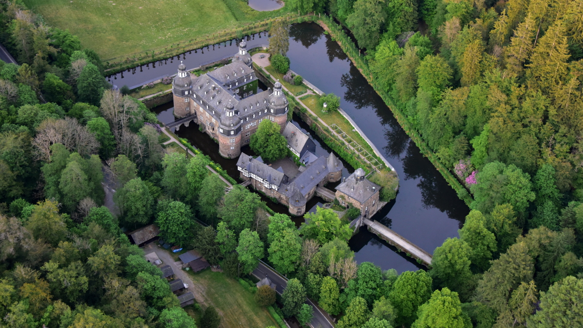 Schloss Crottorf